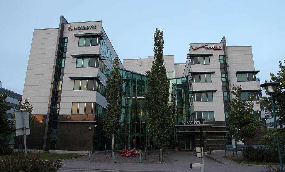 Yrityskeskus Spektrin Kvartti-rakennus Espoon Pohjois-Tapiolassa (Kehä I:n vieressä). Huom: Muista säilyttää viittaus kuvaajaan, mikäli käytät kuvaa.